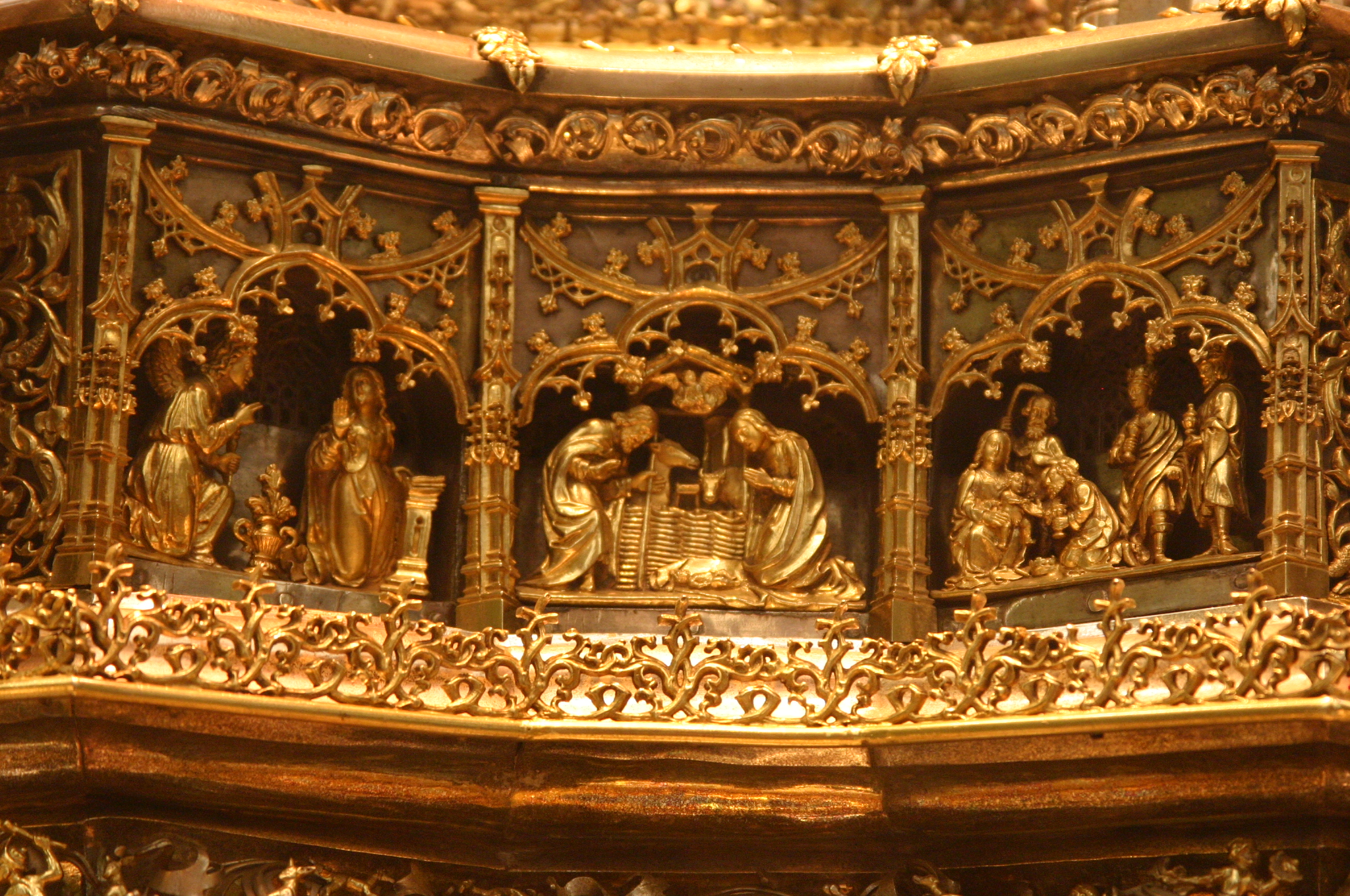 Custodia procesional de la Mezquita-catedral de Córdoba, (España). Fue realizada por el orfebre alemán Enrique de Arfe a principios del siglo XVI.